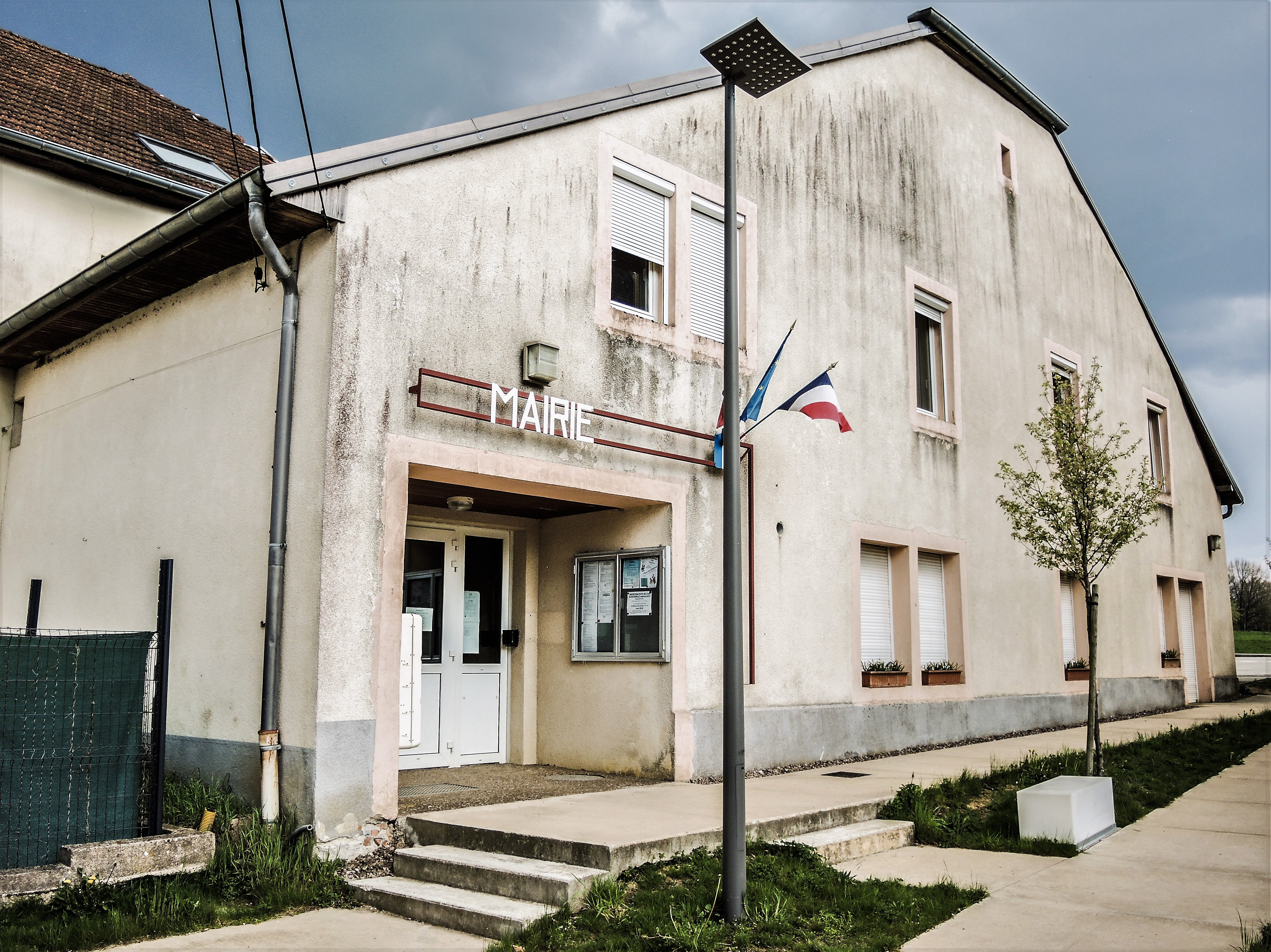 Mairie